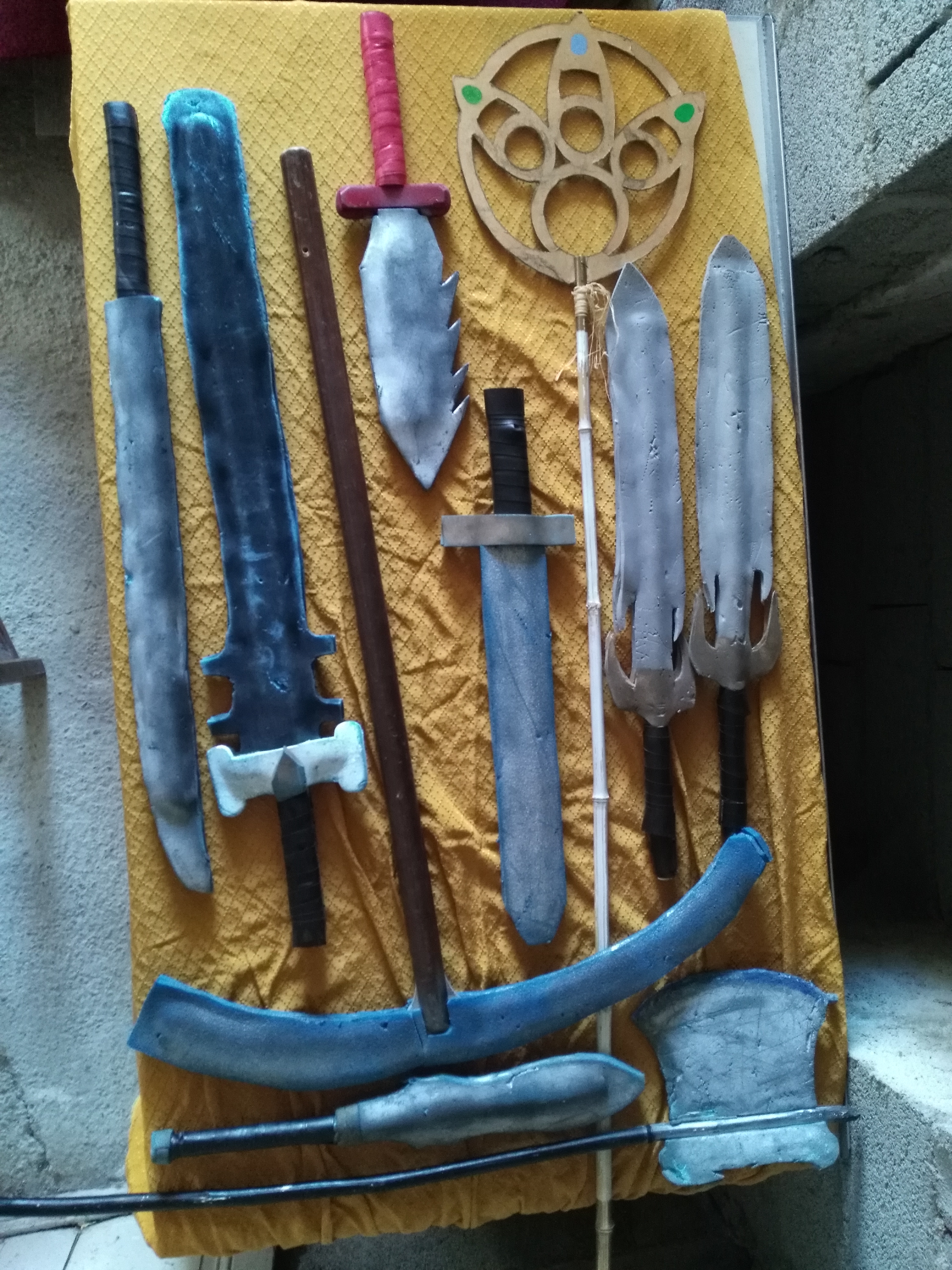 Des armes en mousse artisanales fabriquées pour du jeu de rôles grandeur nature, GN, à partir de contreplaqué et du tapis de camping, peint à la bombe.